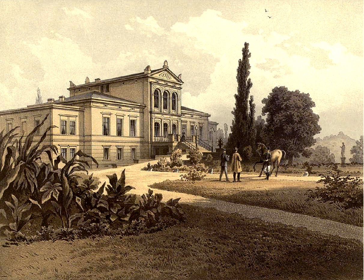 Rittergut Rossoszyca, Kreis Adelnau, Provinz Posen